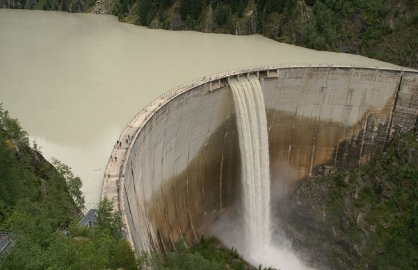 Der Gibidumstausee im Kanton Wallis